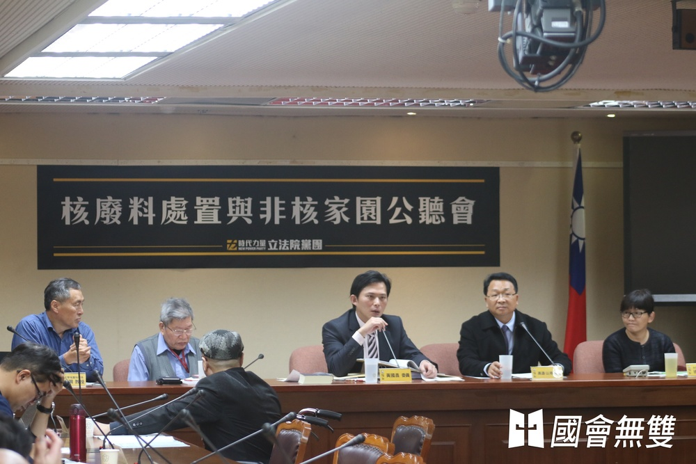 時代力量立法院黨團舉辦「核廢料處置與非核家園公聽會」。